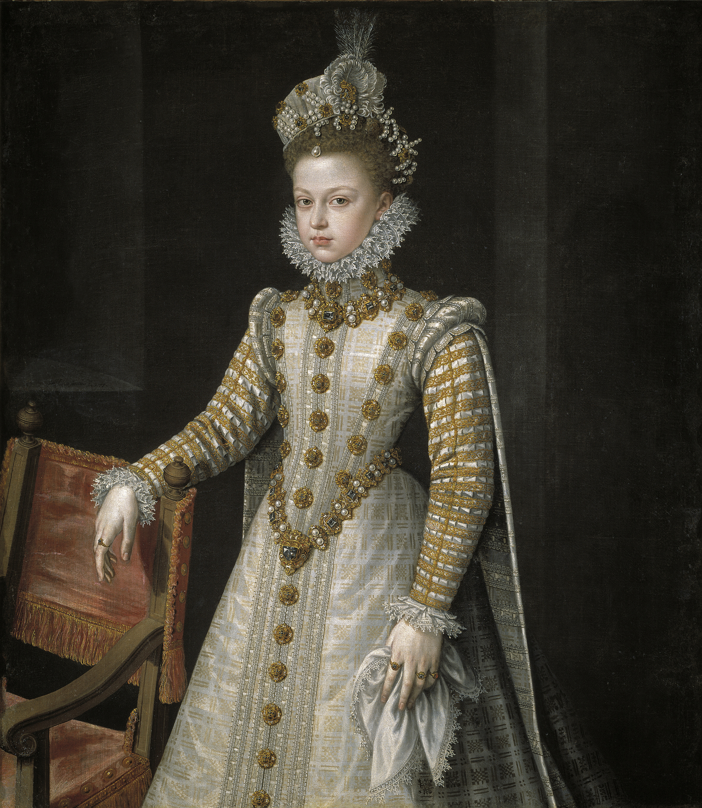 Retrato de la infanta Isabel Clara Eugenia (1566-1633), que fue hija del rey Felipe II de España, esposa del archiduque Alberto de Austria y también soberana y posteriormente gobernadora de los Países Bajos.